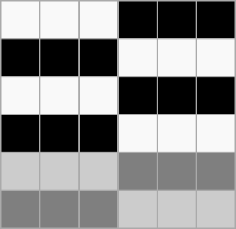 Уточный репс 3/3.